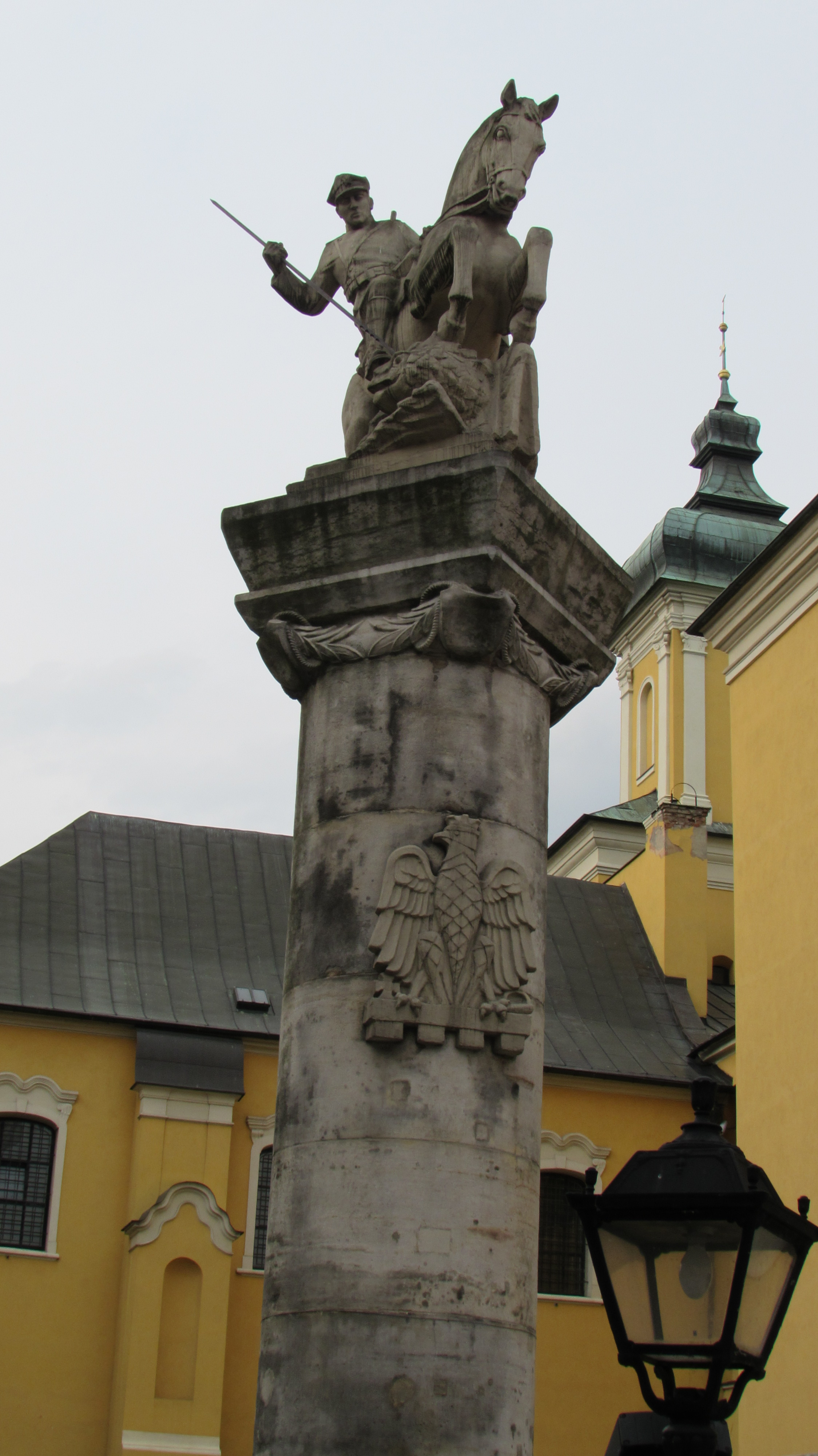 Posen Denkmal zu Ehren des 15. Regiments der Posaner Ulanen